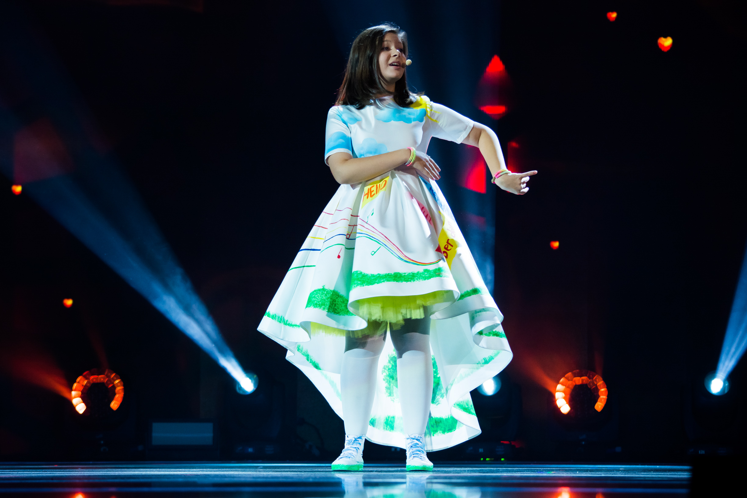 Мишела Рапо на сцене Детского Евровидения 2015 («Армеец», София) во время генеральной репетиции